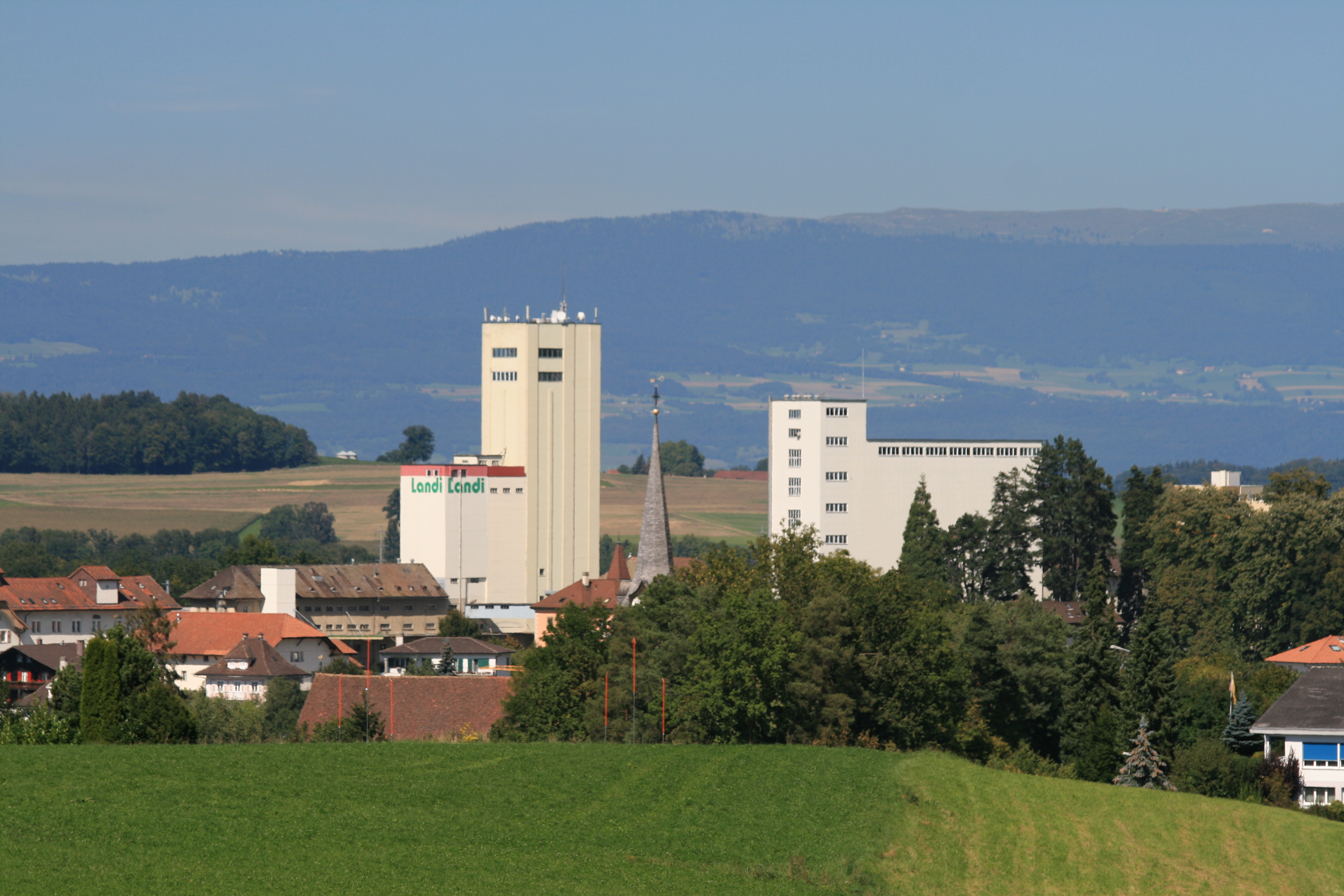 Düdingen, Kanton Freiburg, Schweiz